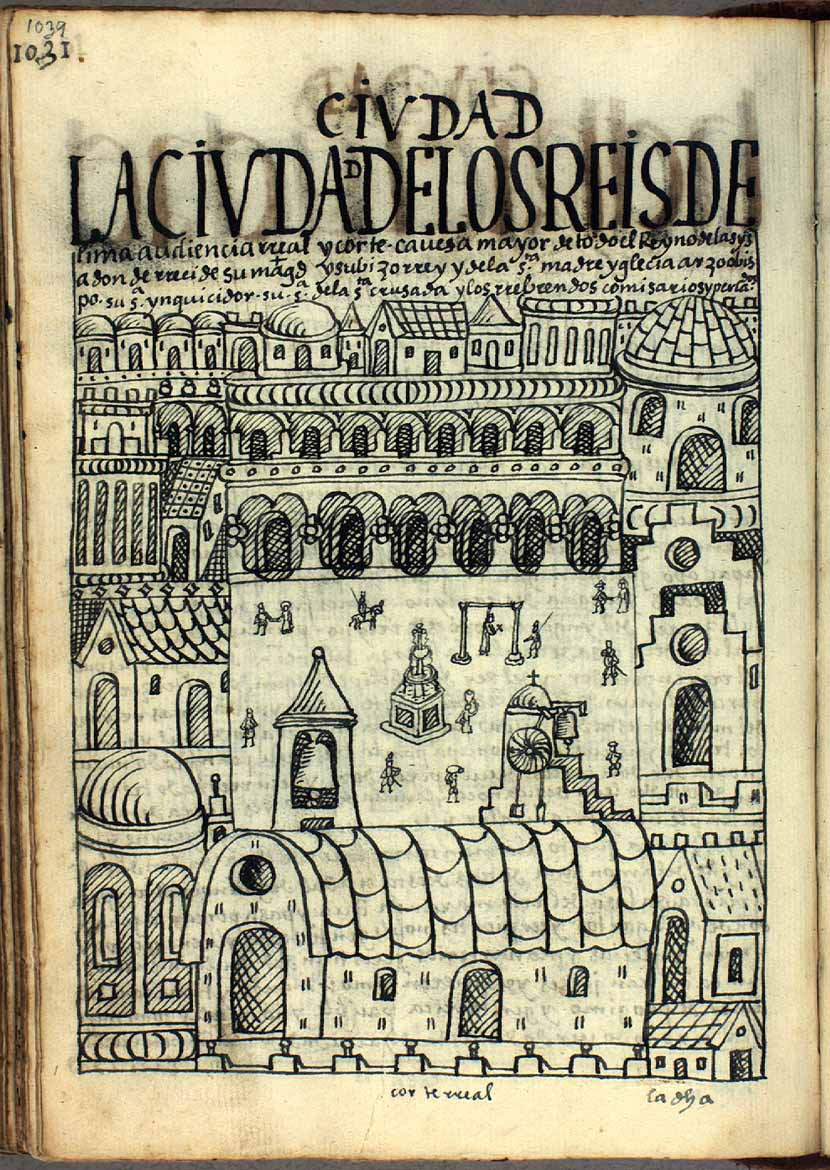 1031 [1039] LA CIVDAD DE LOS REIS DE Lima, audiencia rreal y corte, cauesa mayor de todo el rreyno de las Yndias, adonde rrecide su Magestad y su bizorrey y de la santa madre yglecia, arzoobispo su señoría ynquicidor, su señoría de la santa crusada y los rrebrendos comisarios y perlados. / corte rreal / CIVDAD